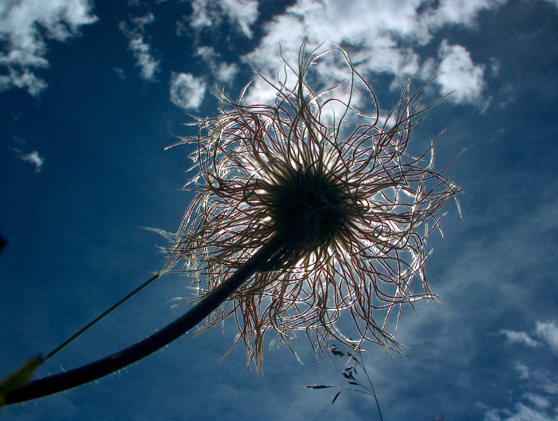 Sonne hinter Pflanze Pulsatilla Fruit